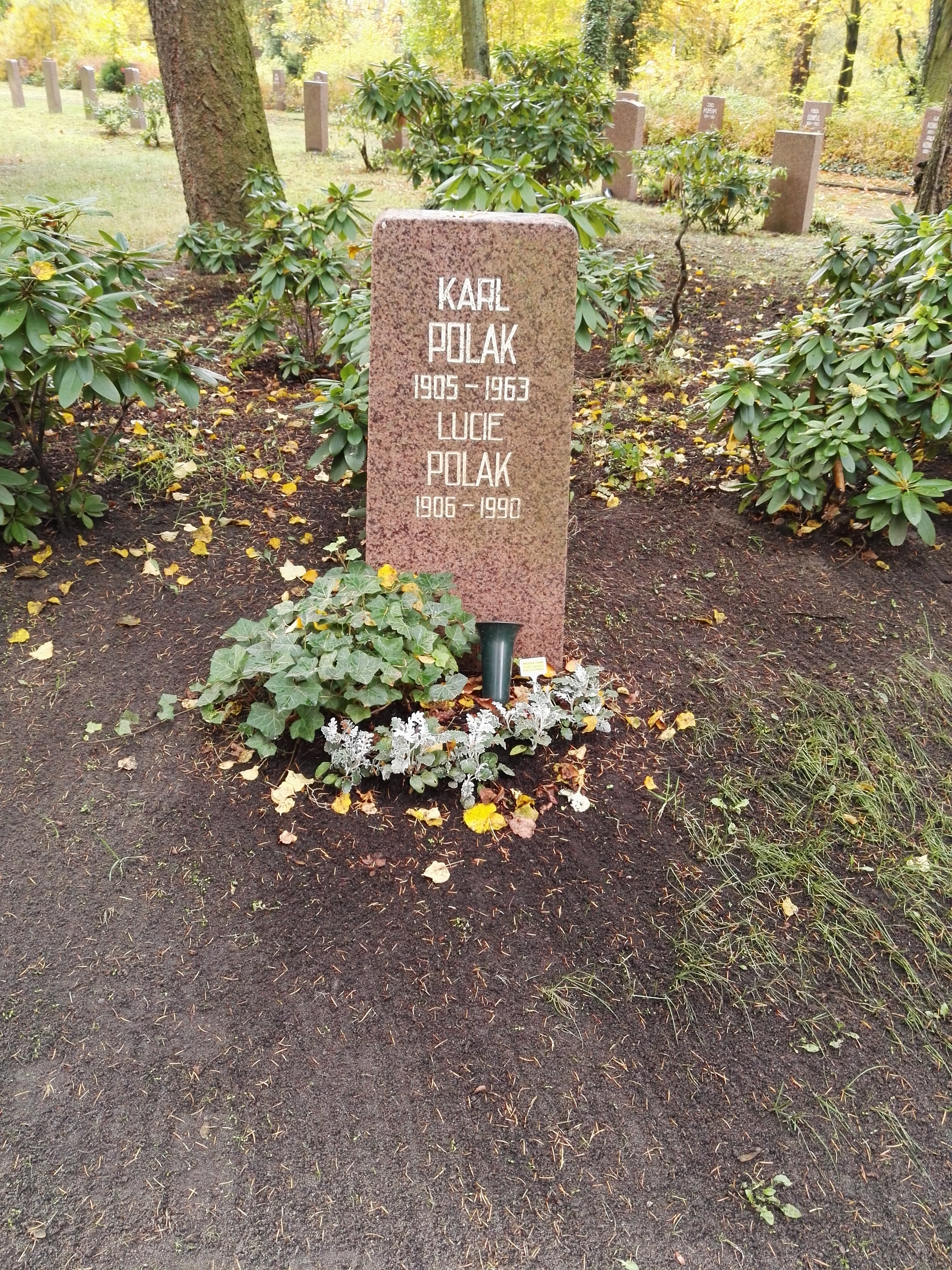 Grab von Karl Polak und Lucie Polak auf dem Sozialistenfriedhof des Zentralfriedhofs Friedrichsfelde